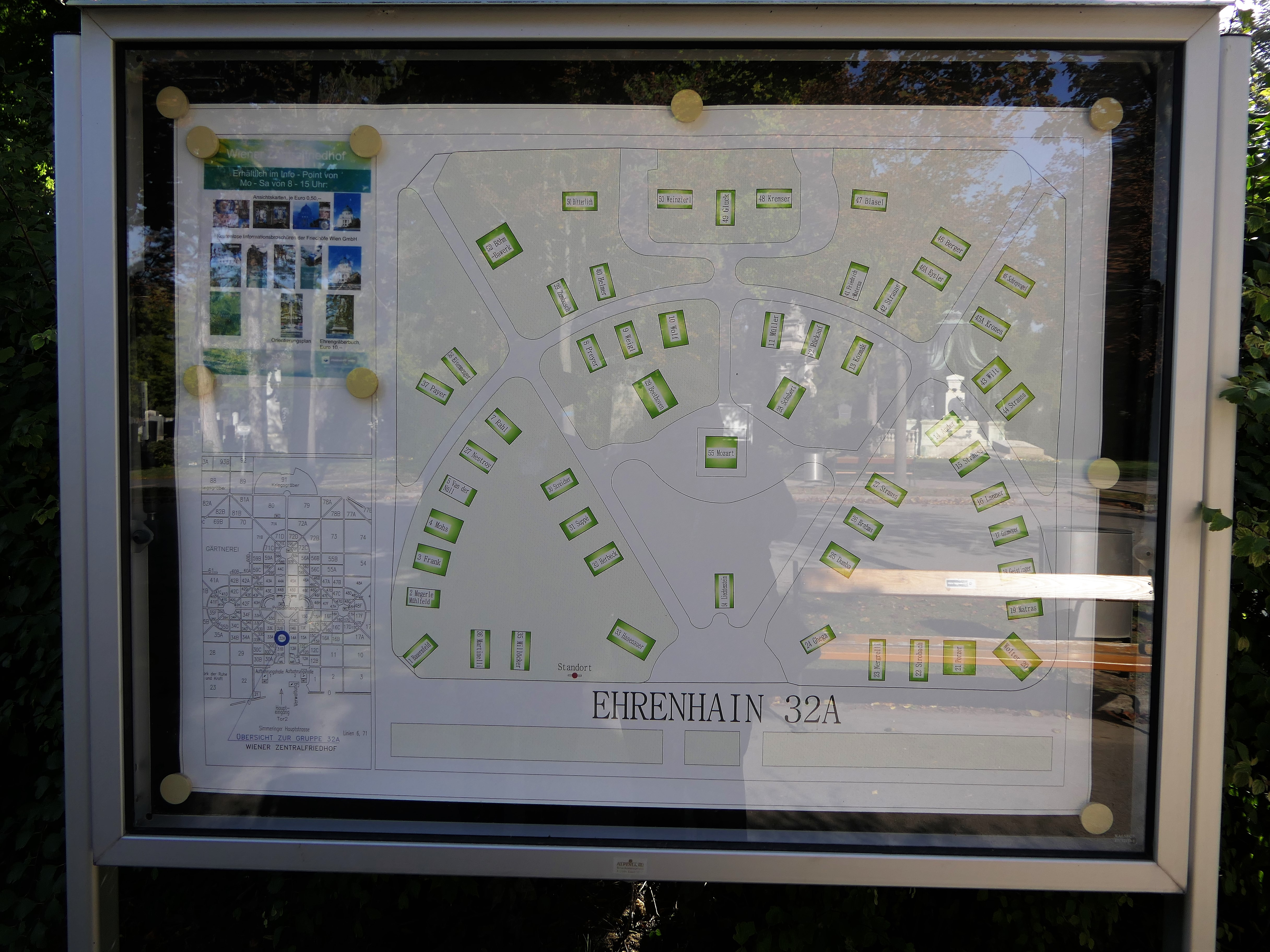 Plan des Ehrenhains 32A auf dem Wiener Zentralfriedhof